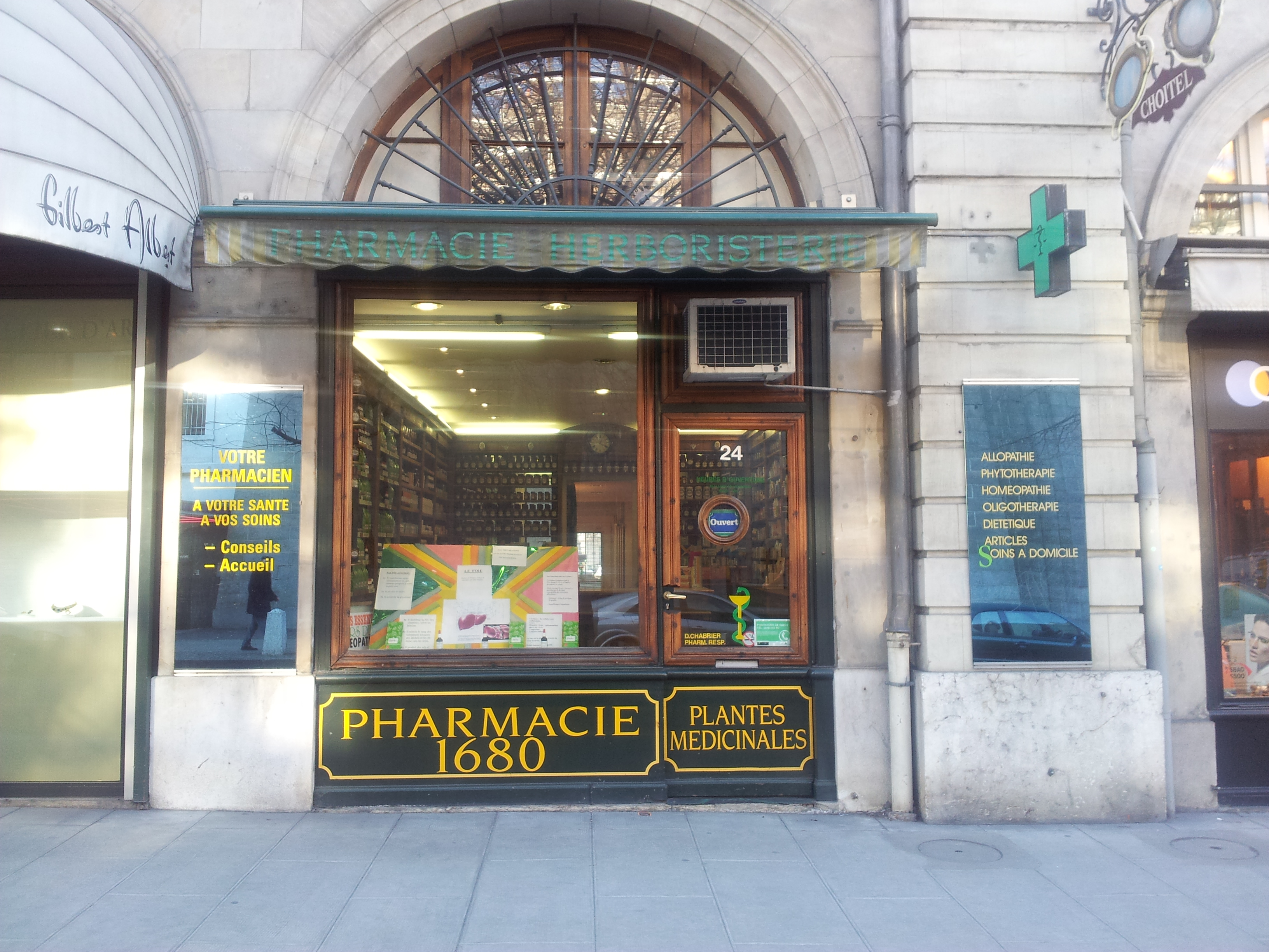 Vitrine Herboristerie Genève Suisse